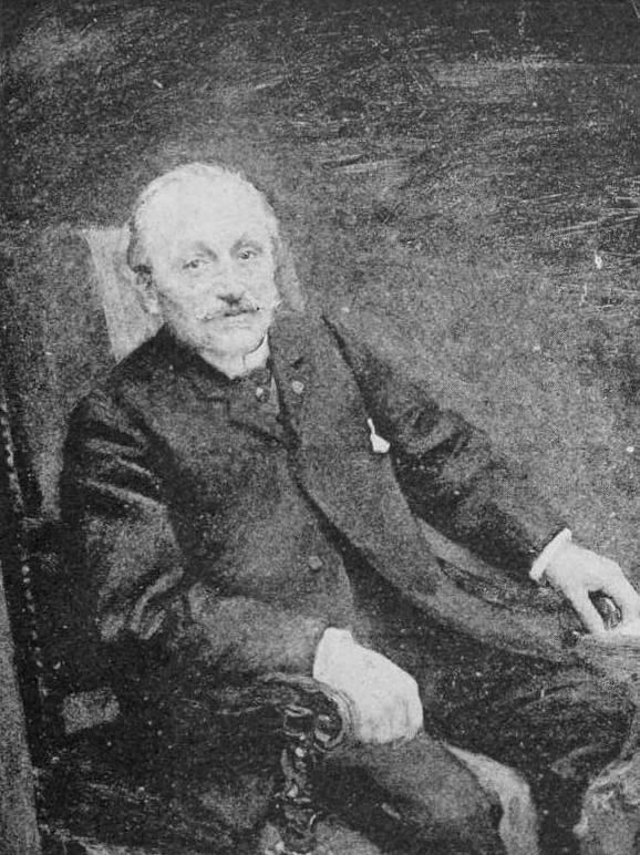 Portrait de M. Dietz-Monnin.